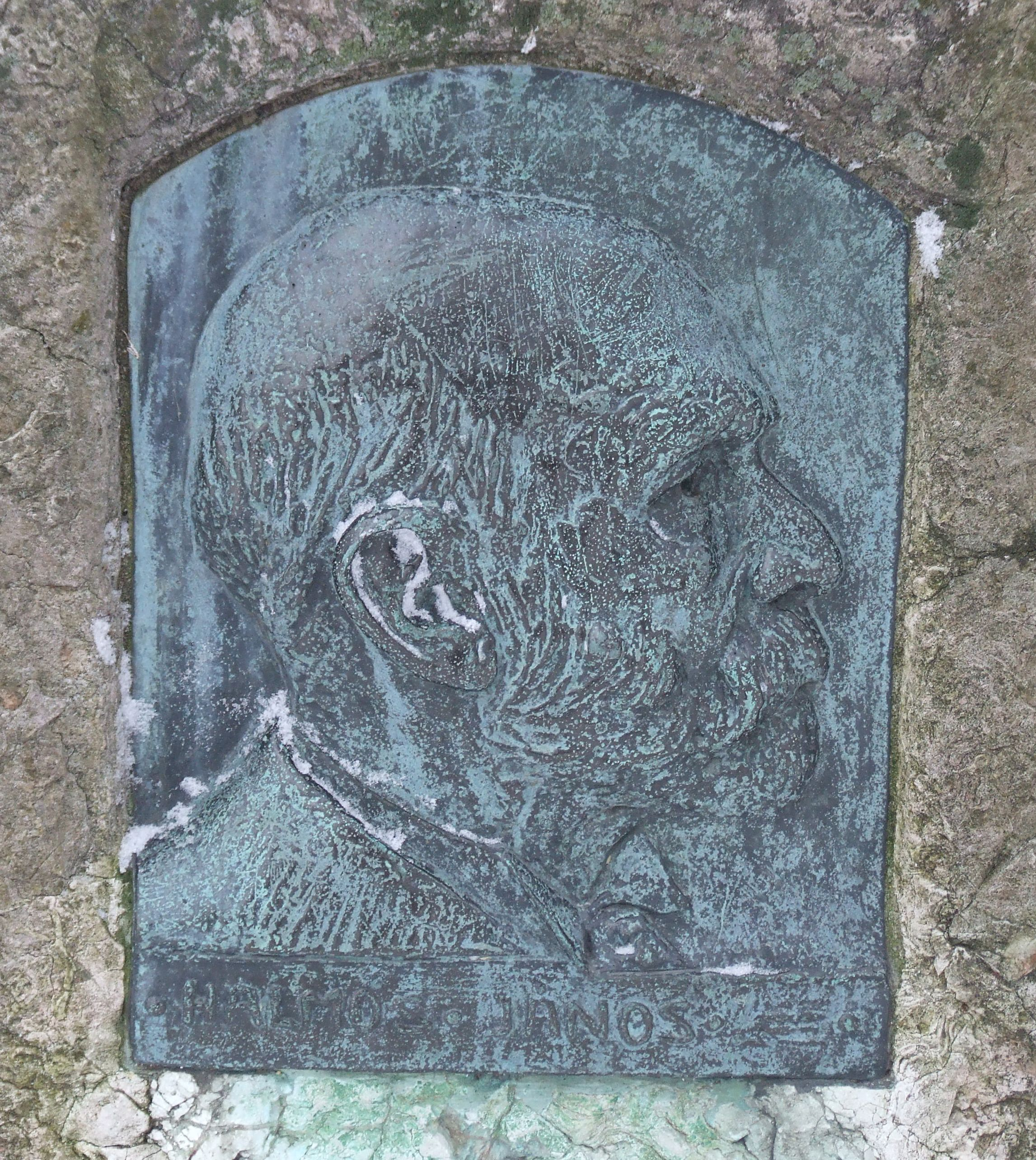 Halmos János egykori polgármester domborműve Normafán (Budapest)